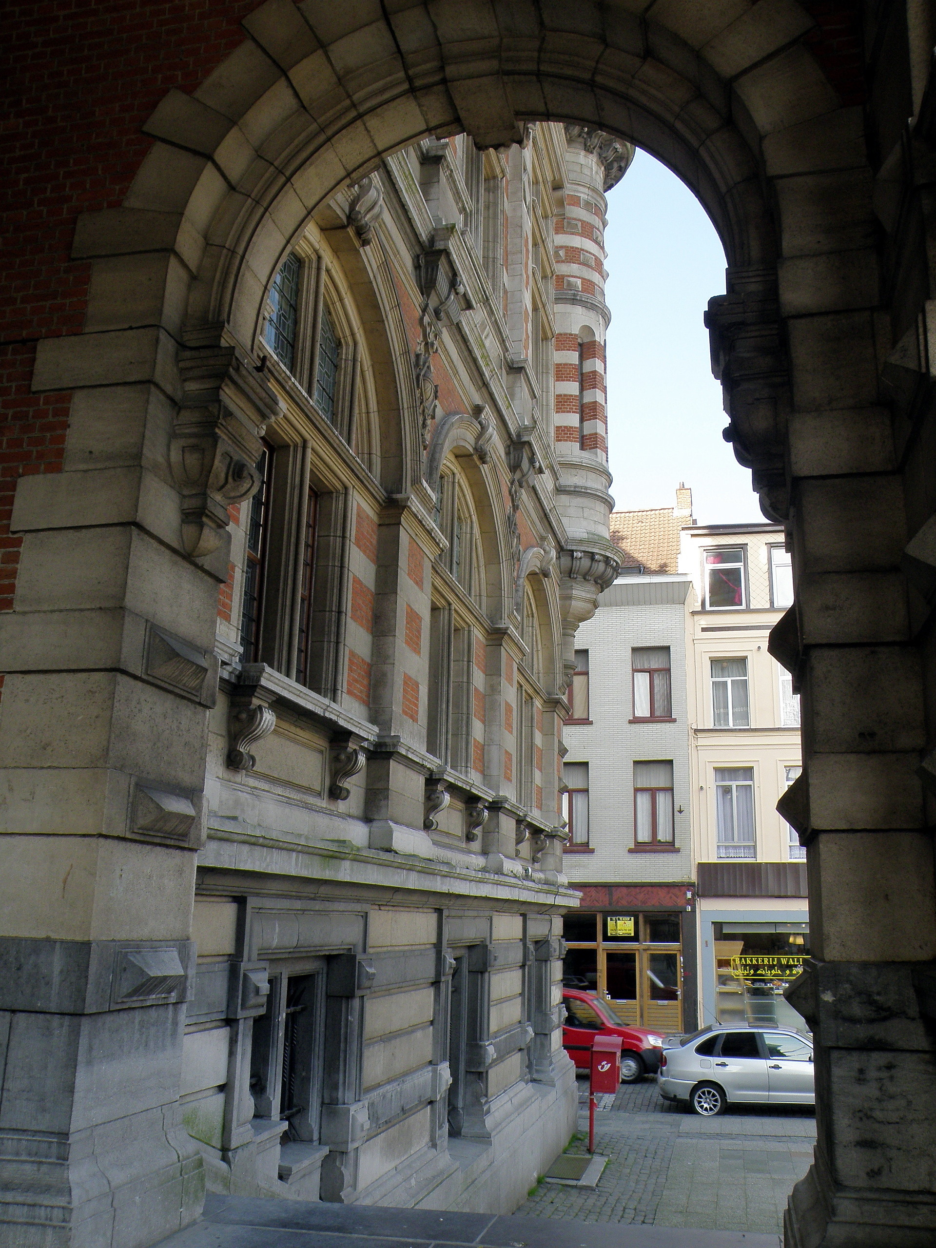 Anvers, Belgique. Mairie de district (en néerl. districtshuis ; anciennement maison communale, = mairie) de Borgerhout, sise Moorkensplein. Édifice de style néo-Renaissance flamande, 1886-1889, plans de Henri & Léonard Blomme. Vue vers l'ouest depuis le porche de la façade principale (nord).